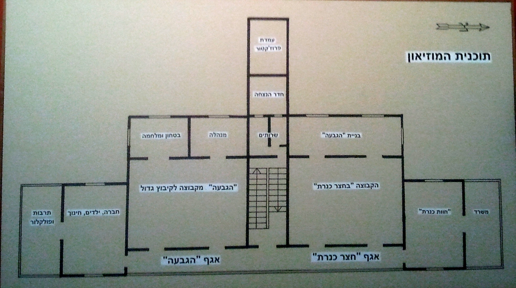 מוזיאון לתולדות כנרת נפתח בשנת 2006 במבנה במבנה בשנת 1929 תוכנית המוזיאון